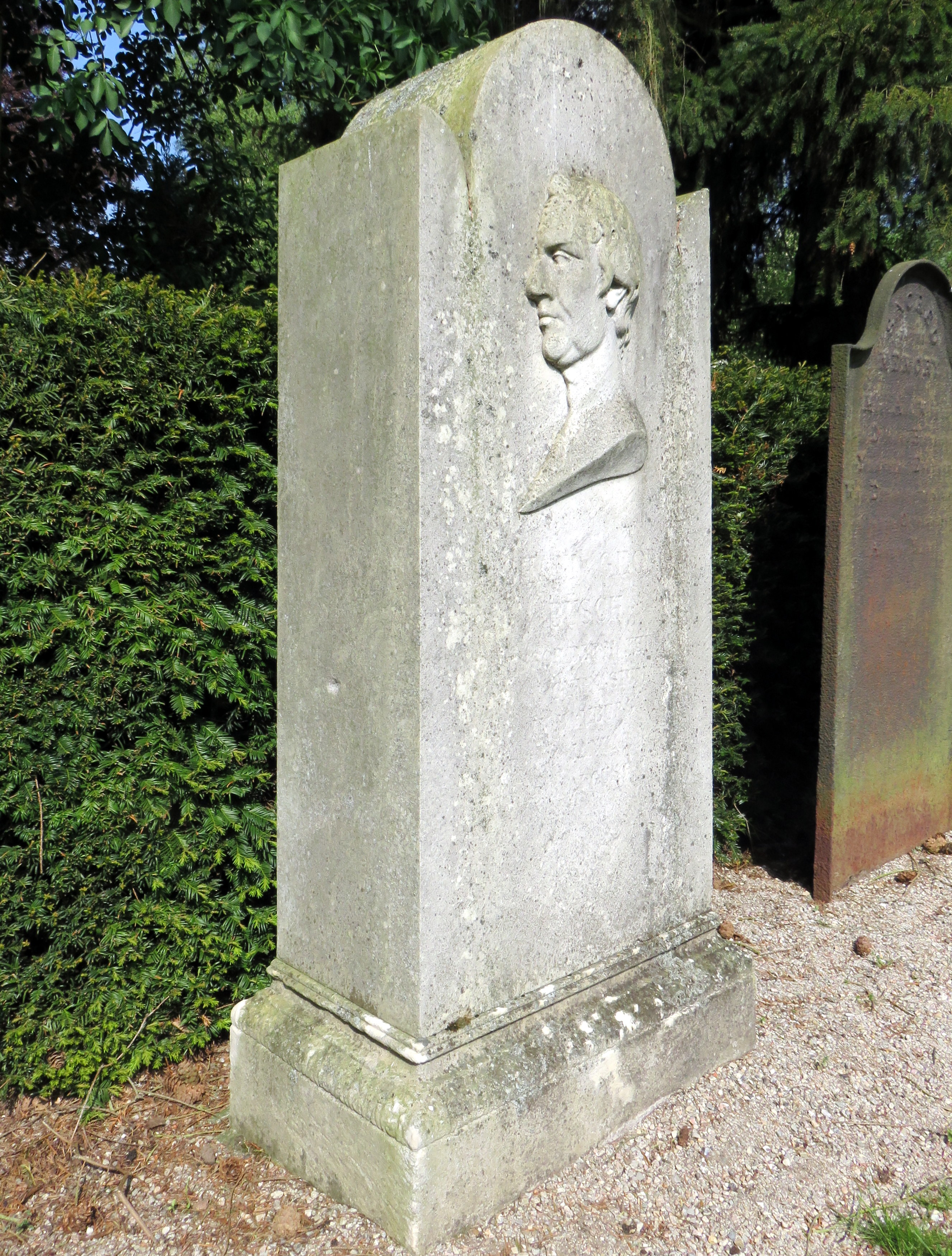 Sandstein-Grabmal (1794) für den Pädagogen Johann Georg Büsch im Grabmal-Freilichtmuseum Heckengarten auf dem Hamburger Friedhof Ohlsdorf.